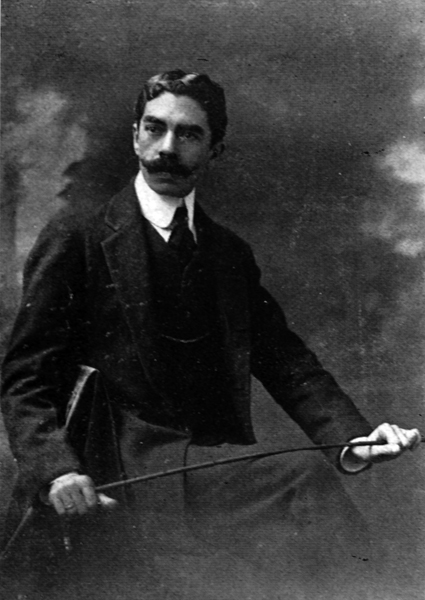 El escritor peruano Clemente Palma